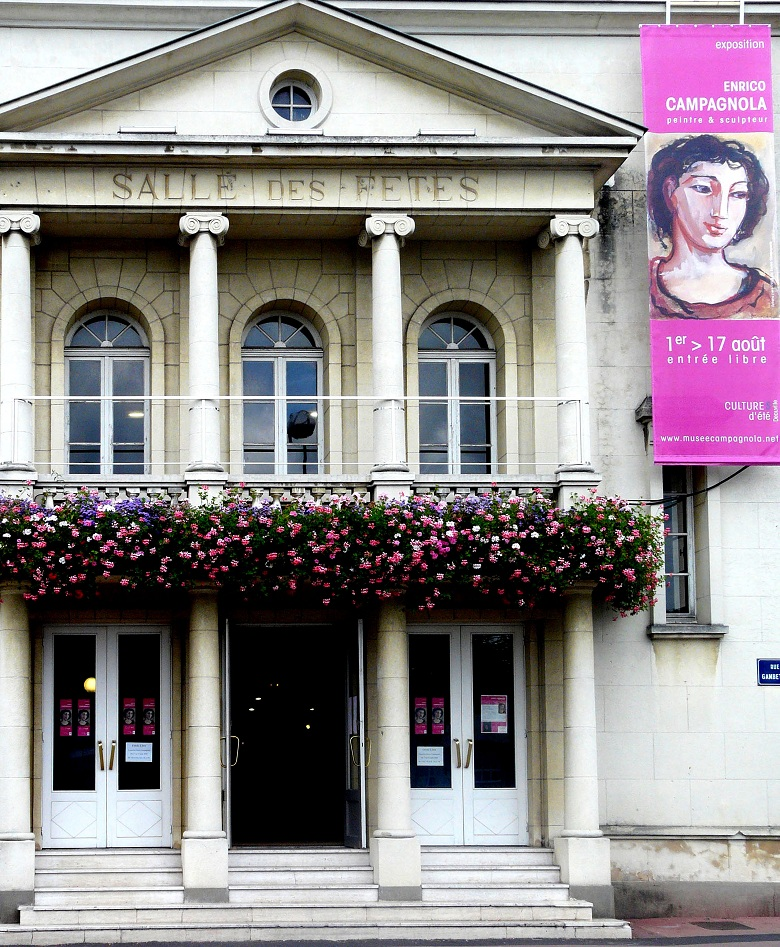 Affiche de l'exposition des œuvres d'Enrico Campagnola à Deauville en 2008.